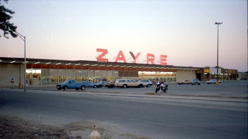 Addison, IL.